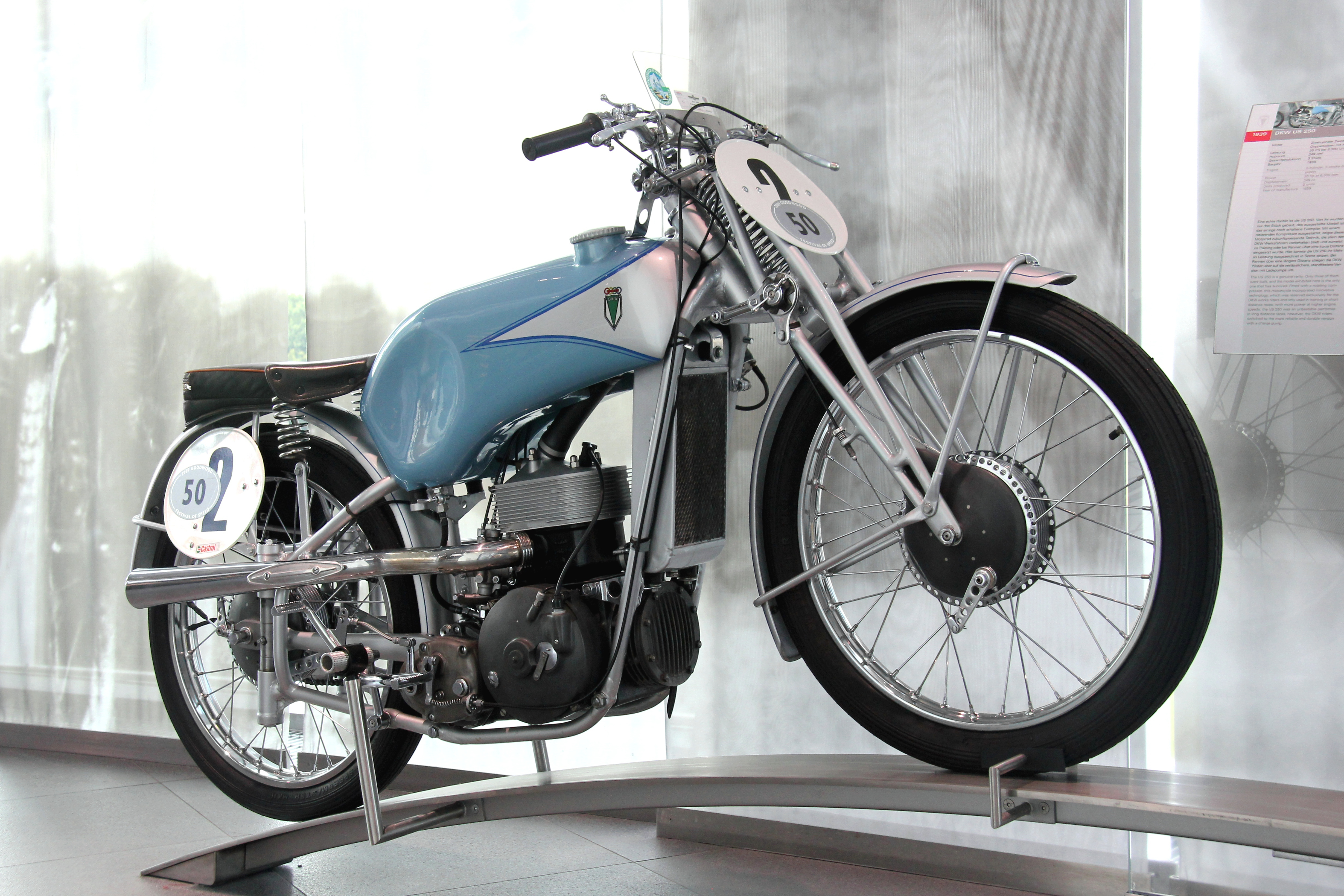 DKW SS 250 im museum mobile in Ingolstadt. Zweitakt-Doppelkolbenmotor mit Ladepumpe